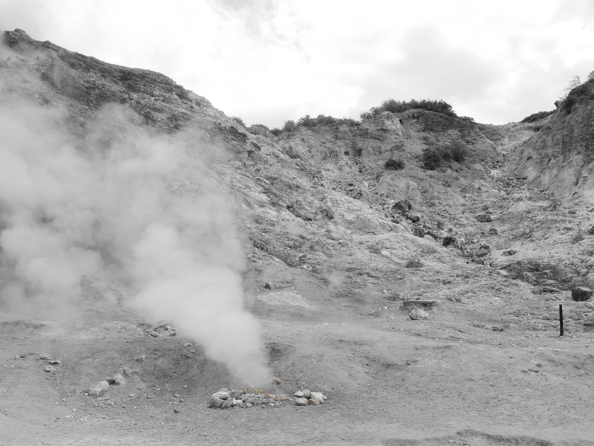 Volcano Solfatara